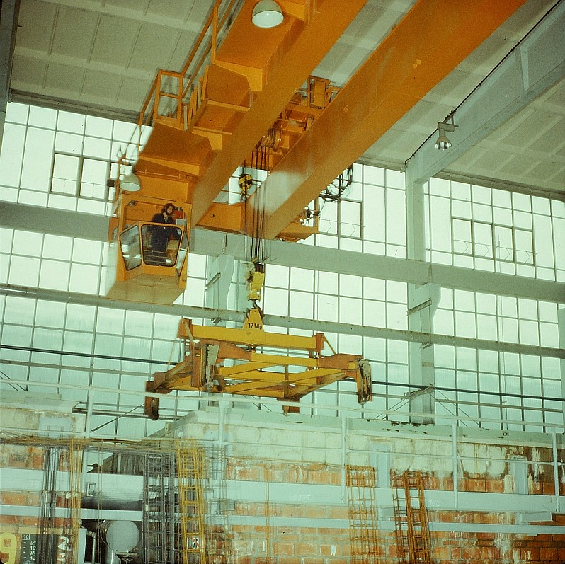 Original image description from the Deutsche Fotothek Betonwerker